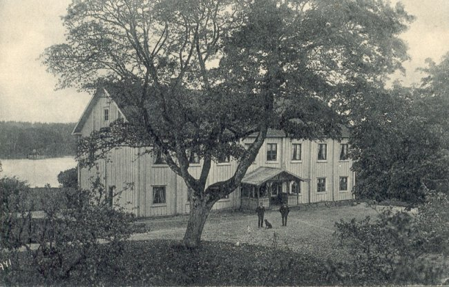 Schedingsnäs manor (Schedingsnäs säteri), Forsheda, Sweden